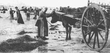 Photo d'un détail d'une vieille carte postale française datant depuis plus de 100 ans. Récolte de varech (algues marines) Titre original : De Blainville à Coutainville - La pêche au varech à la marée montante [1]